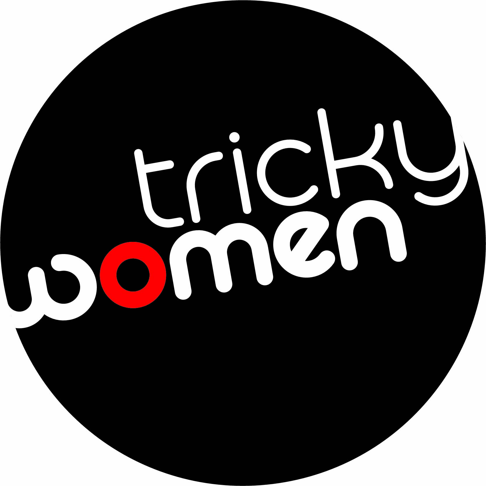 Logo von Tricky Women International Animation Filmfestival